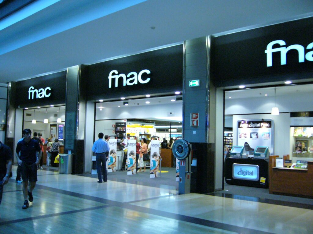 Fnac Almada.